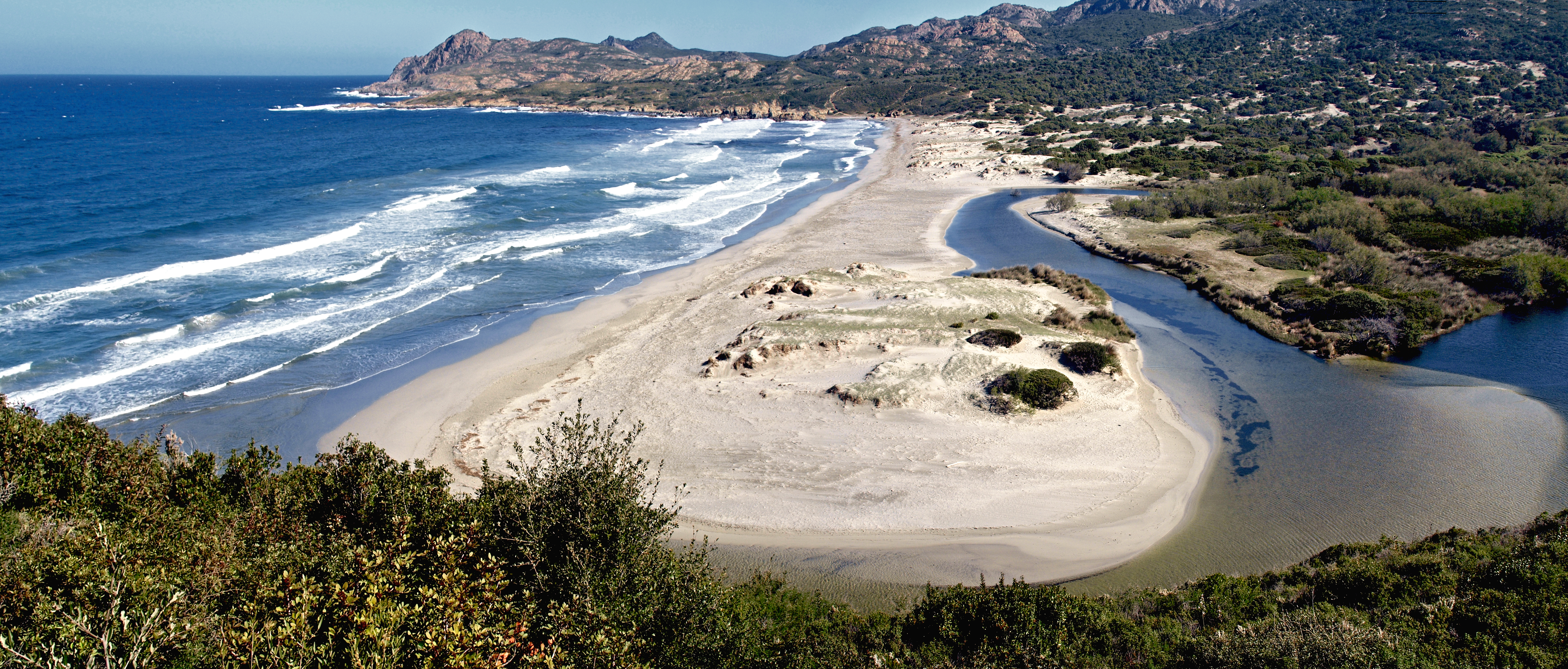 Palasca (Corsica) - L'Ostriconi, fleuve et plage